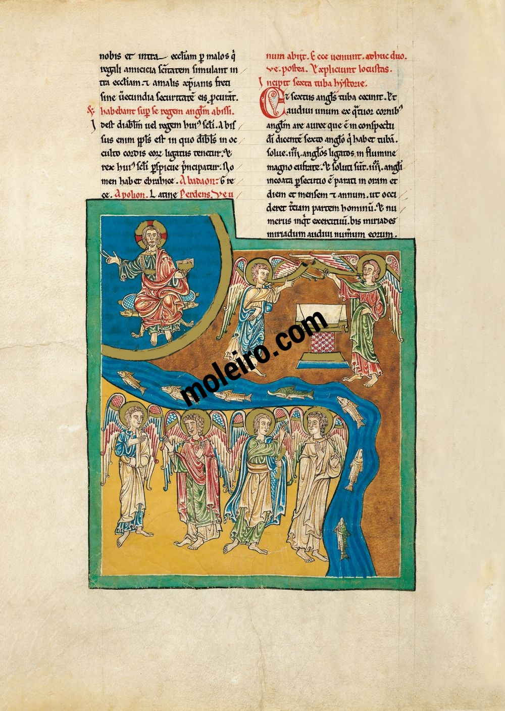 Miniatura del Beato de Girona